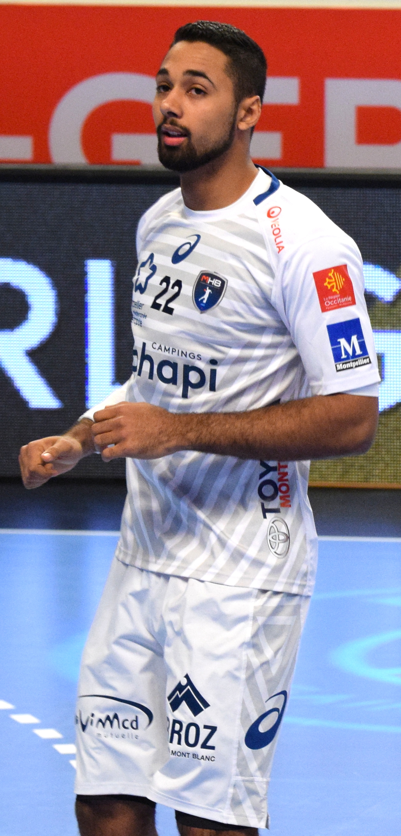 Rencontre de championnat entre le PSG et Montpellier. A Coubertin, le 1er mars 2018.